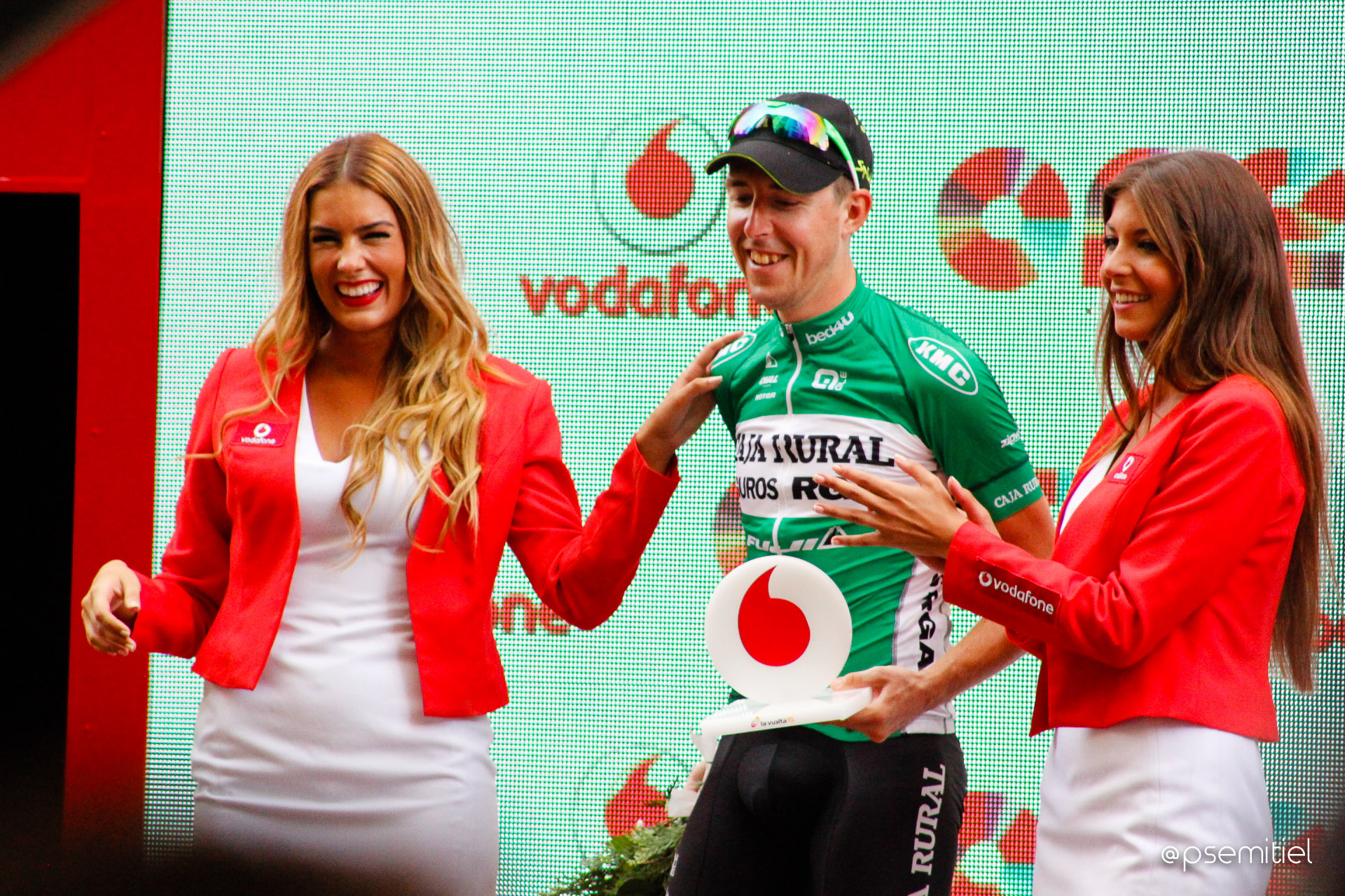 Vuelta a España 2015 | 8ª Etapa Puebla de Don Fadrique - Murcia-98